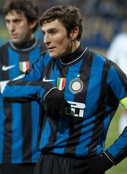 Javier Adelmar Zanetti